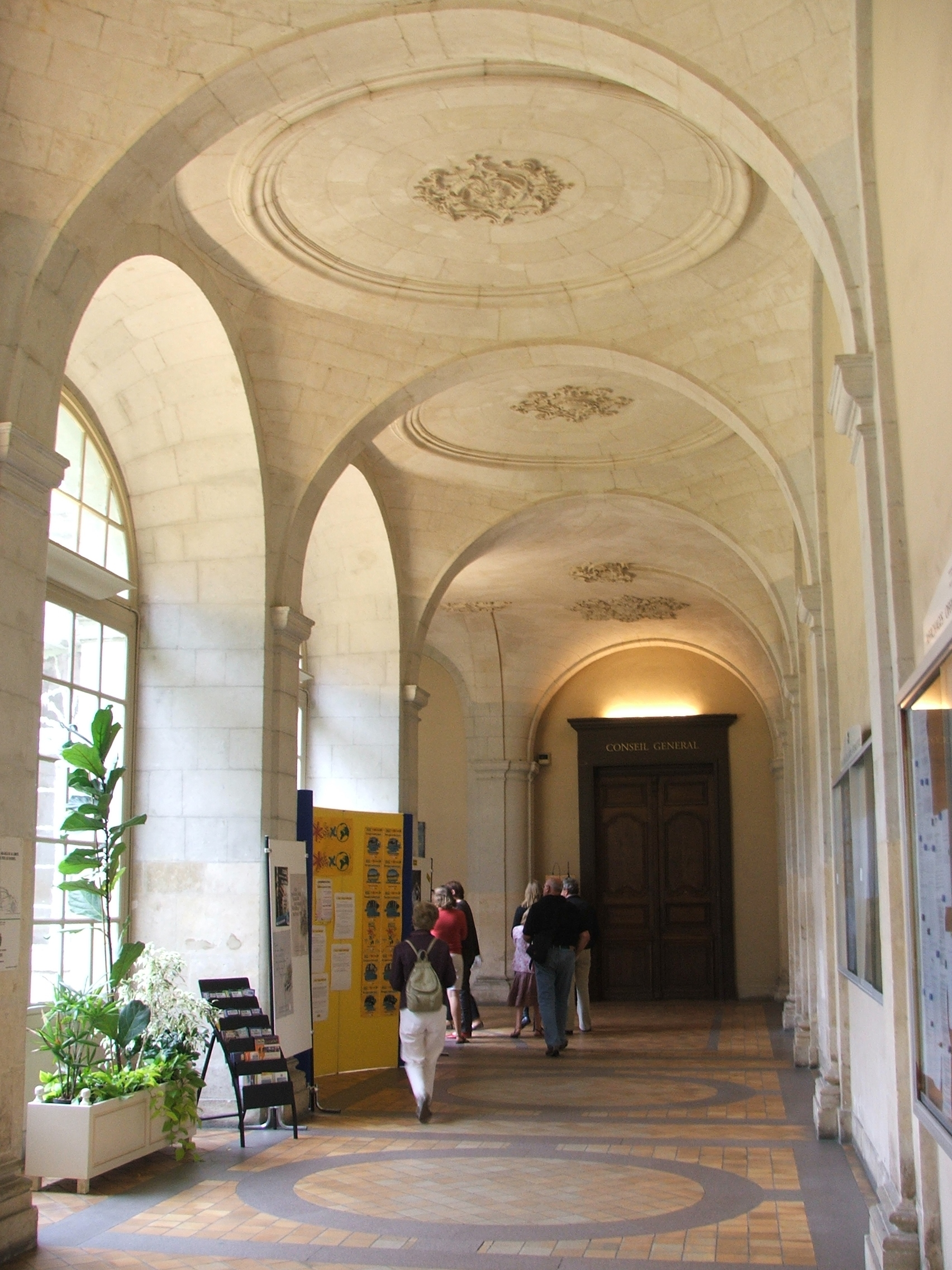 A l'intérieur de la préfecture du Mans.